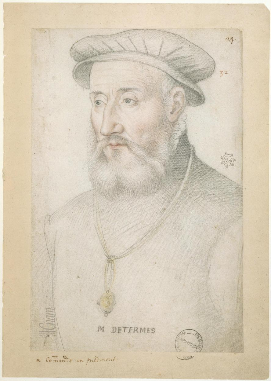 Portrait of Paul de Labarthe, maréchal de Thermes